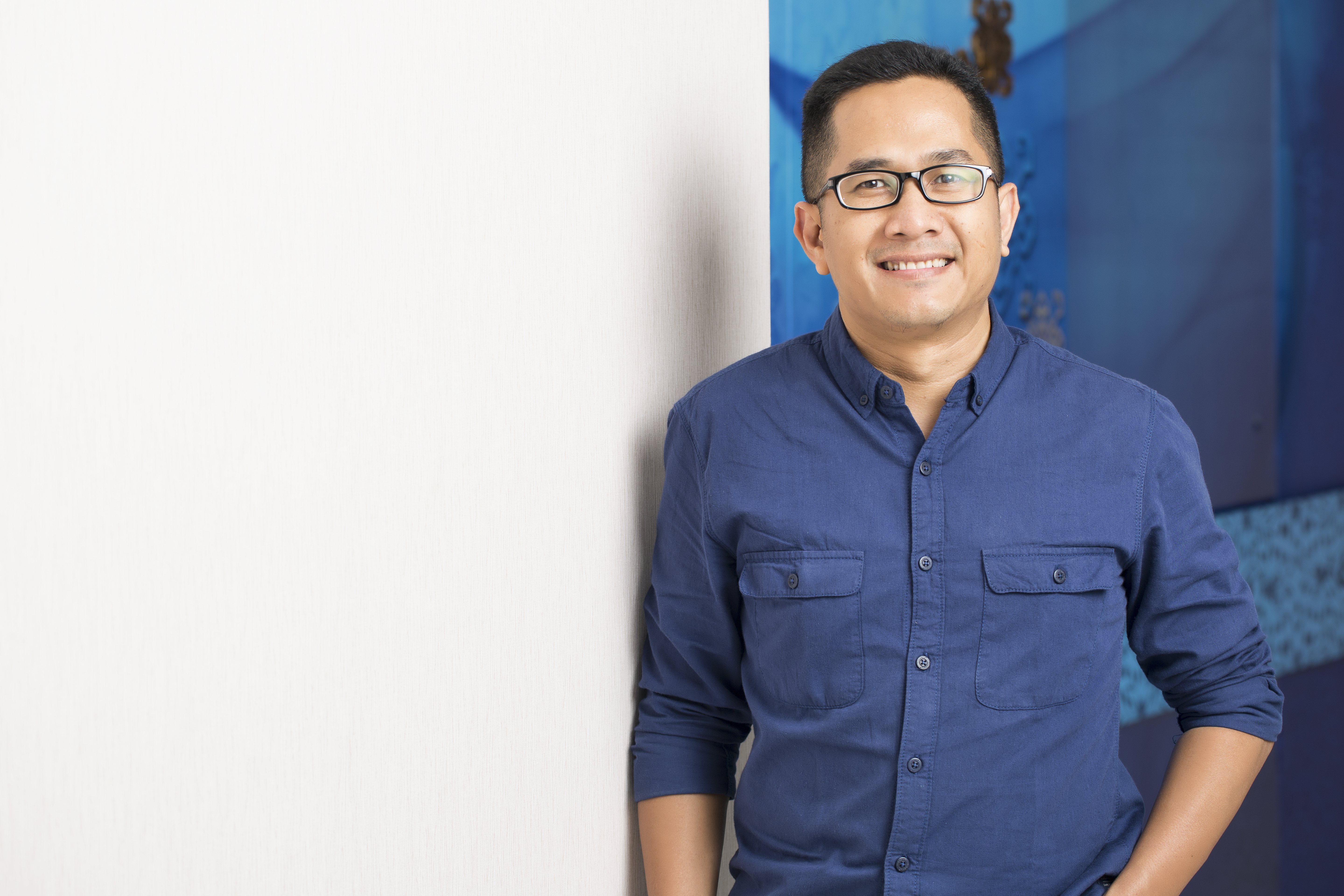 Andre Syahreza, jurnalis dan penulis buku.